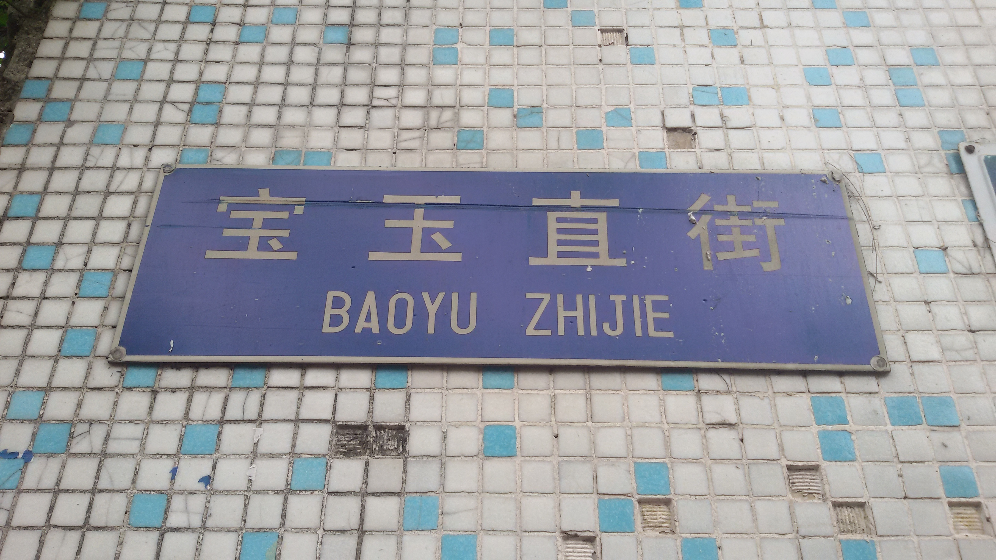 粵語: 寶玉直街嘅巷牌